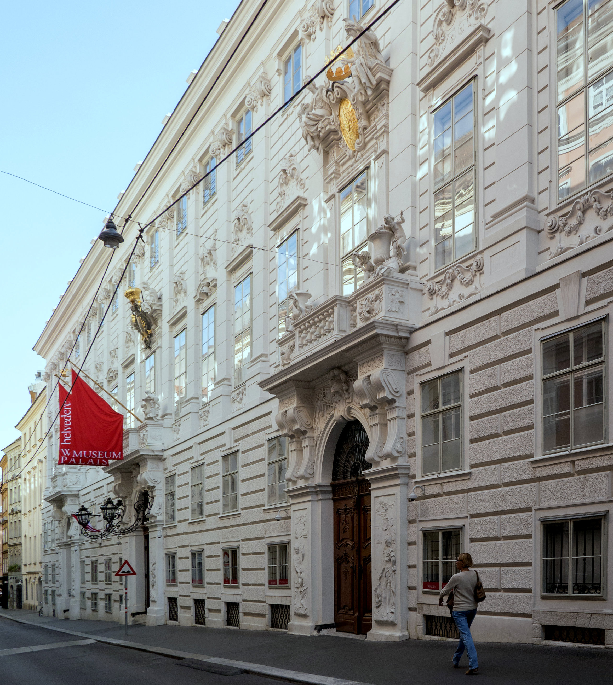 Belvedere – Winterpalais, Sala terrena Dieses Bild wurde anlässlich des österreichischen Tags des Denkmals 2014 in Wien eingereicht.